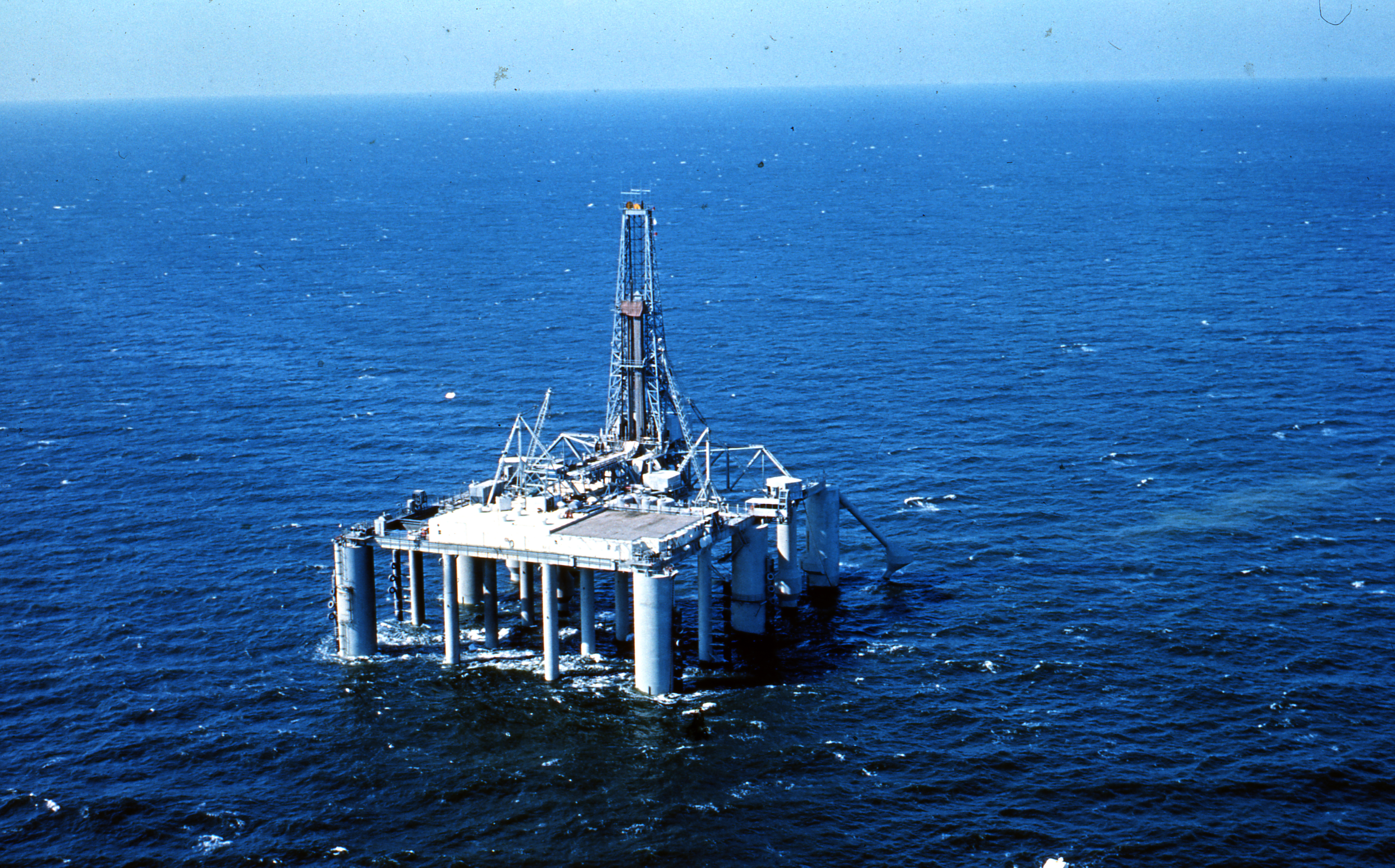 Bildet er hentet fra Arkivverket. Boring i Mexicogulfen. Original tekst: "Drilling in the Gulf of Mexico". Arkivinstitusjon : Statsarkivet i Stavanger Arkivnavn : Pa 1512 - Esso Exploration and Production Norway Inc. Sted : USA, , , Emneord: Olje, Oljeplattform, Petroleum Avbildet